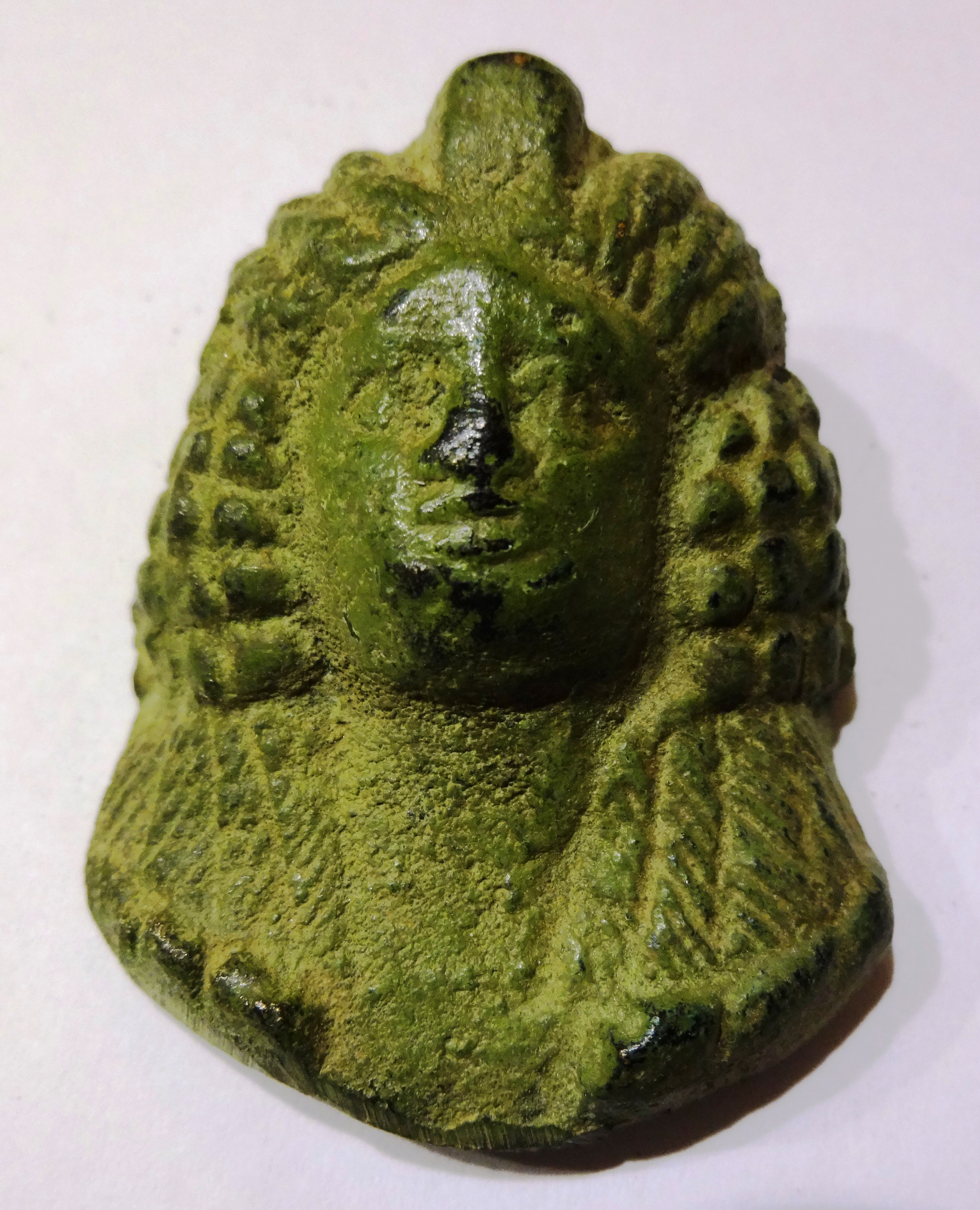 römische Applike, Frauenkopf, Bronze